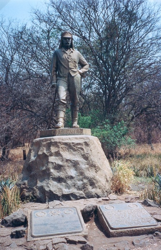 Copyright : Georgio Sujet : Statue de Livingstone au bord des chutes Victoria (Zimbabwe) Année : Septembre 1991